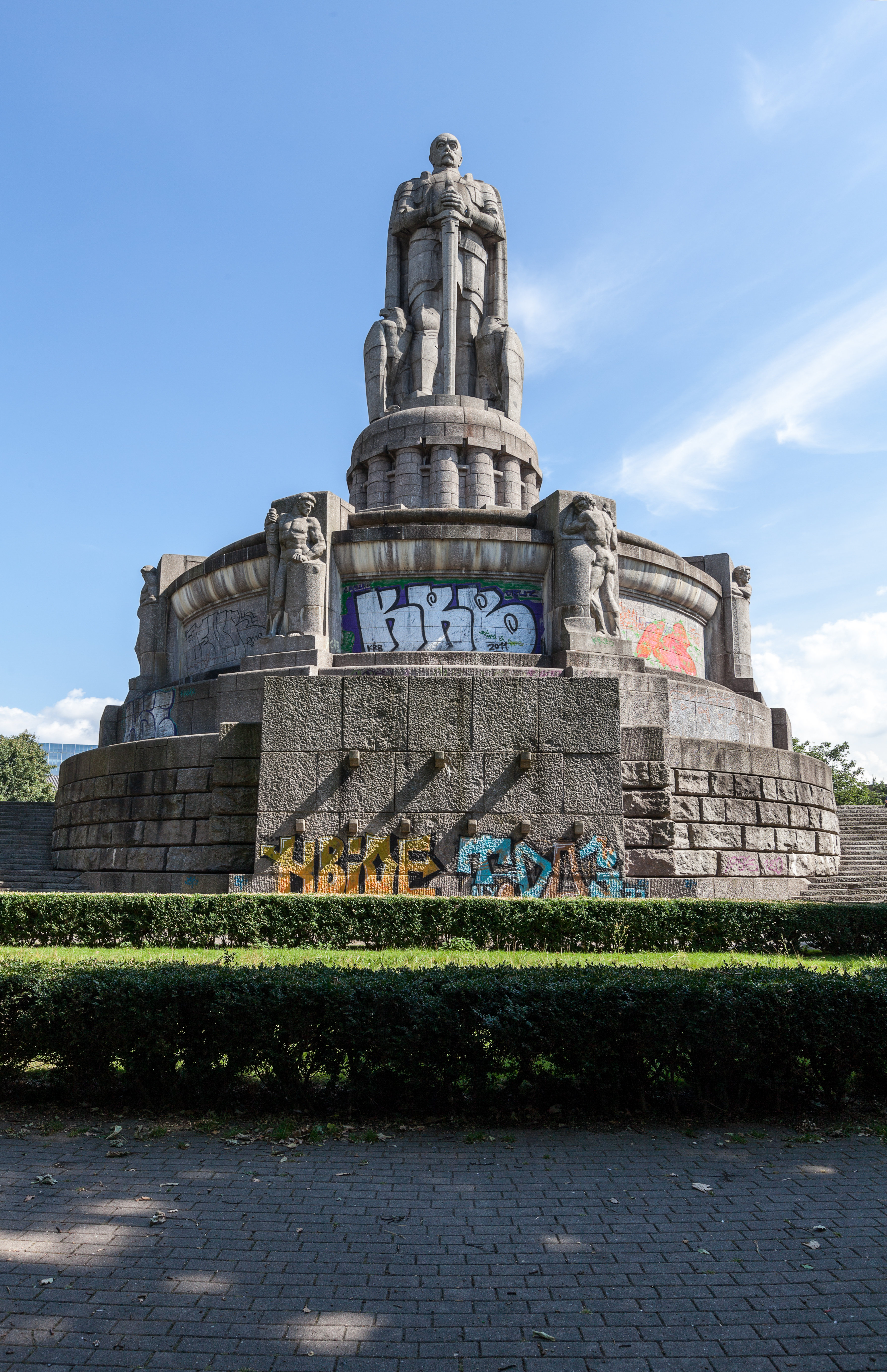 Frontalansicht des Bismarck-Denkmals in Hamburg